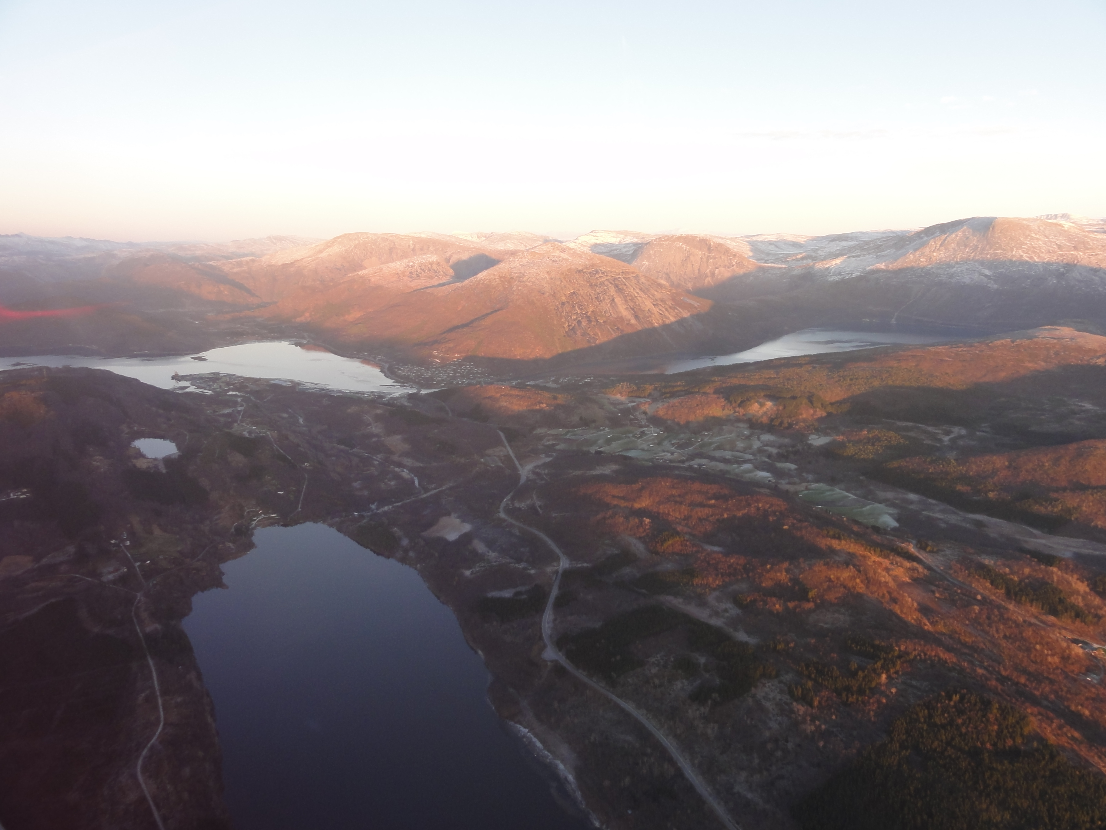 Straumen omentrent midt i bildet og ligger i enden av fjorden Sørfolda. I forgrunnnen sees Vallvatnet. Straumen er administrasjonssenteret i Sørfolda kommune i Nordland. Salten verk kan skimtes ut mot fjorden helt til venstre i bildet.